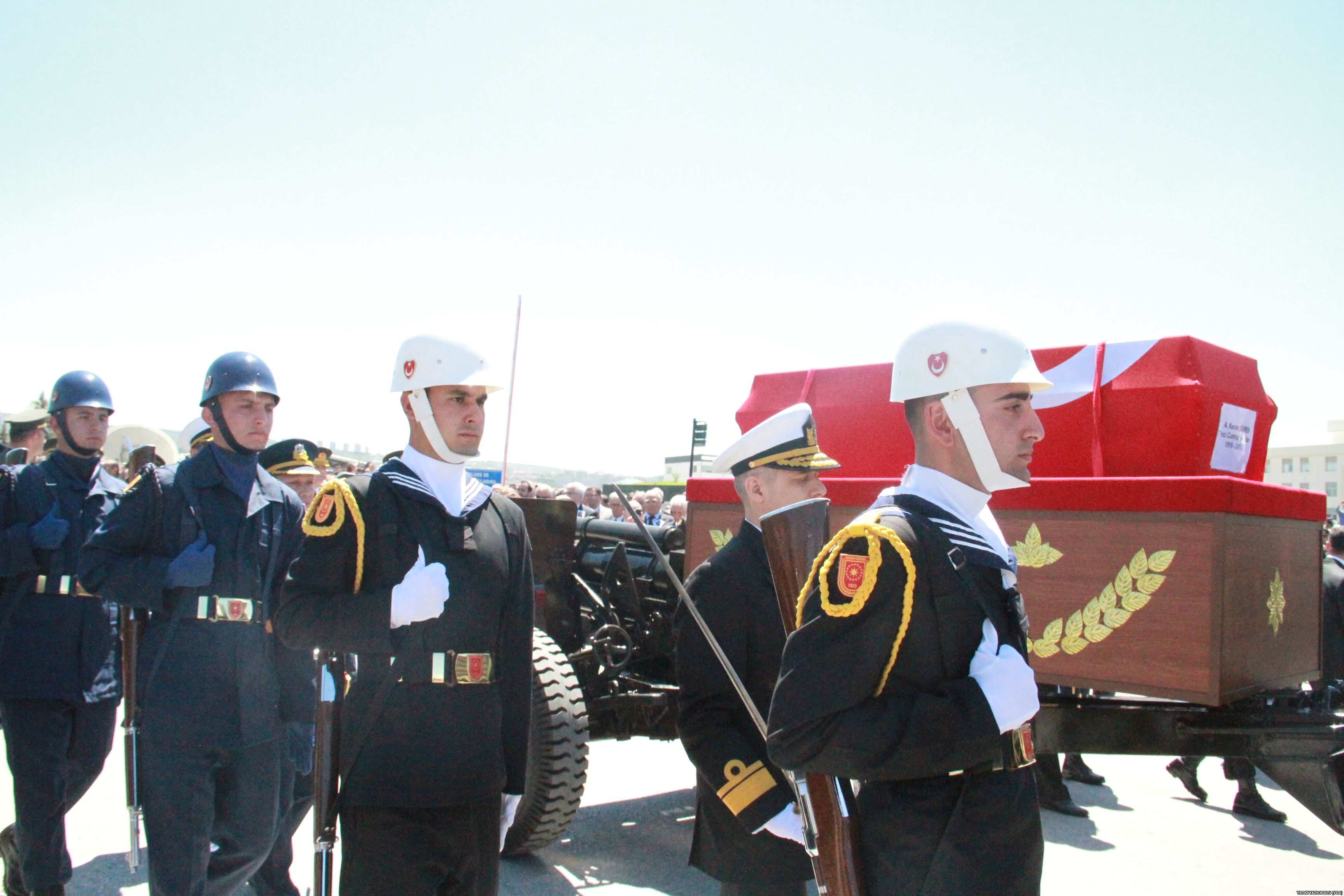 Kenan Evren'in 12 Mayıs 2015 tarihindeki cenazesinden bir kare.